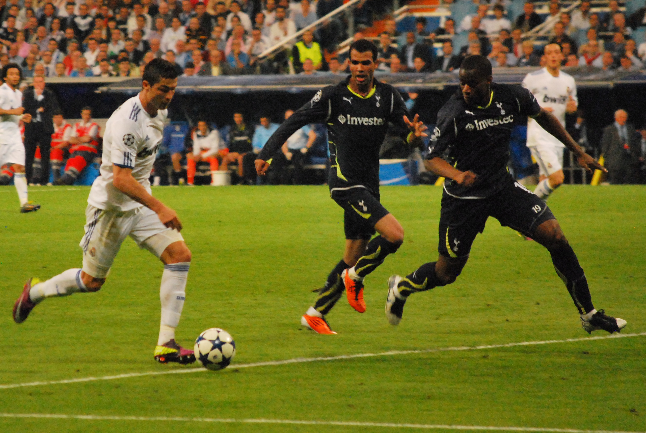 Cristiano Ronaldo